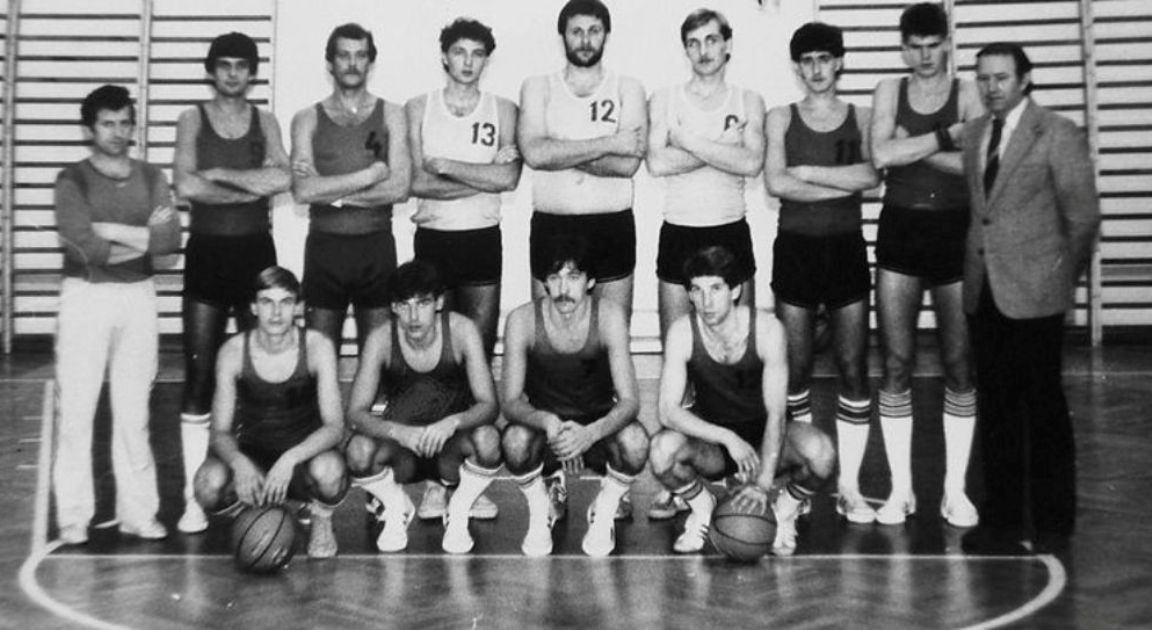 Spójnia Stargard II liga